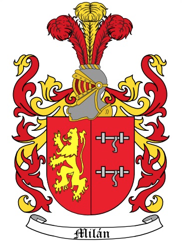 Honorario familia MILÁN